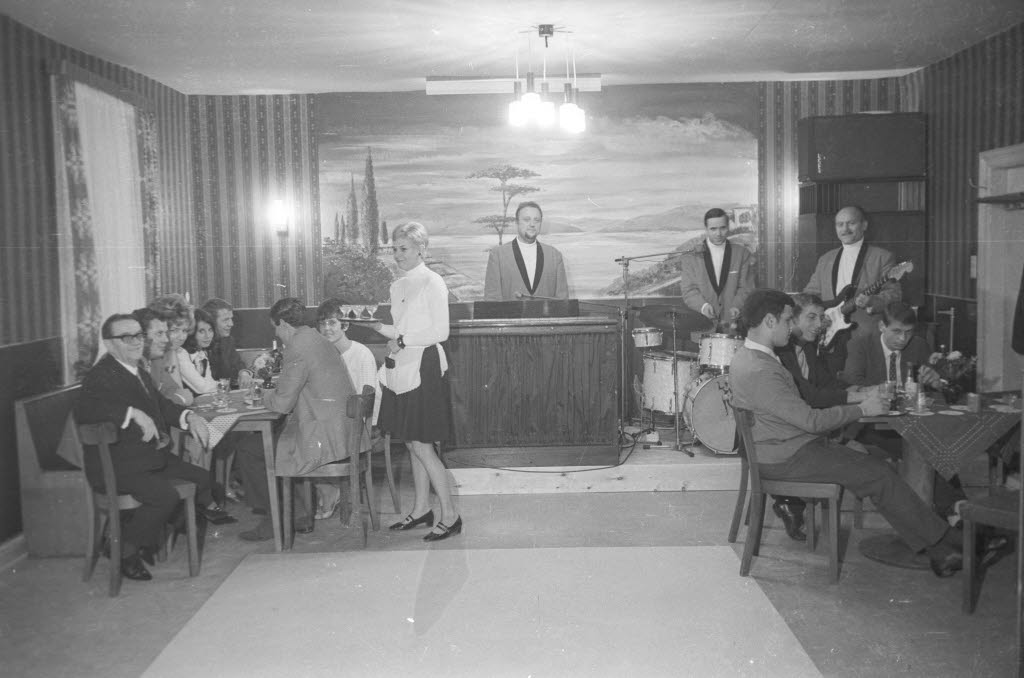 Saalneueröffnung in Brunos Lust in der Dorfstraße 3 in Kronshagen